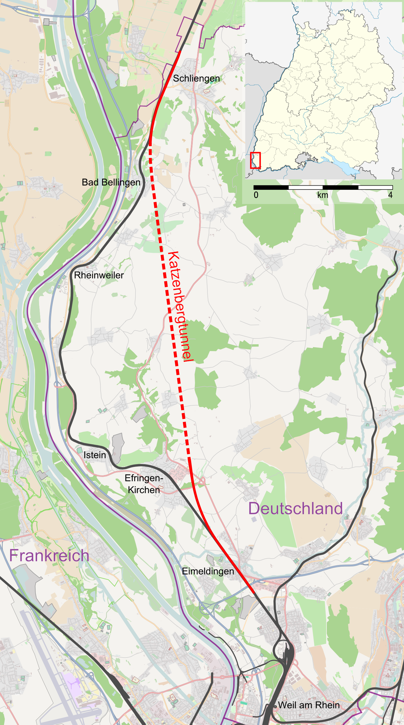 Verlauf des Katzenbergtunnels This map may be incomplete, and may contain errors. Don't rely solely on it for navigation.